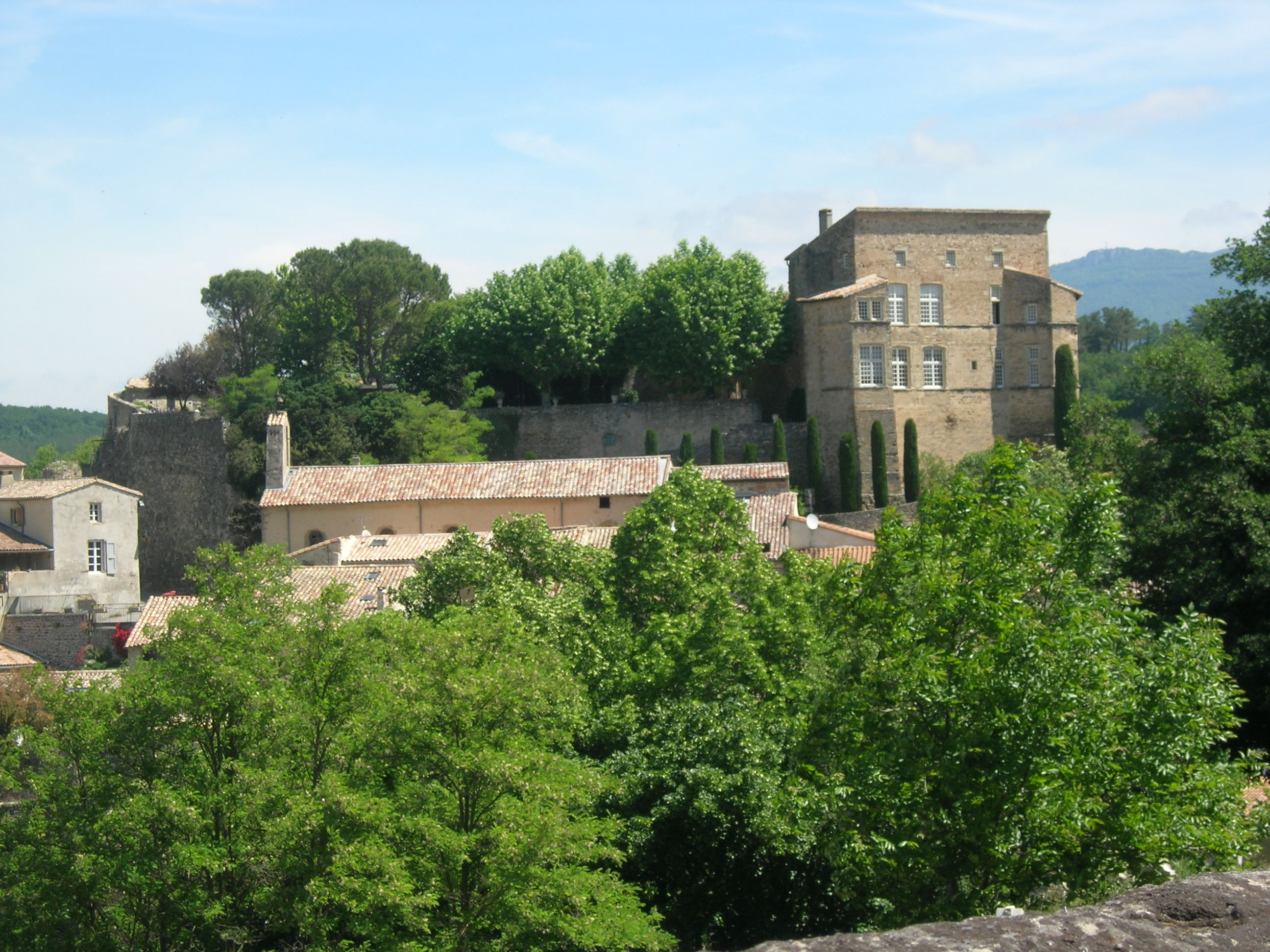 Le château d'Eurre (département de la Drôme, France)